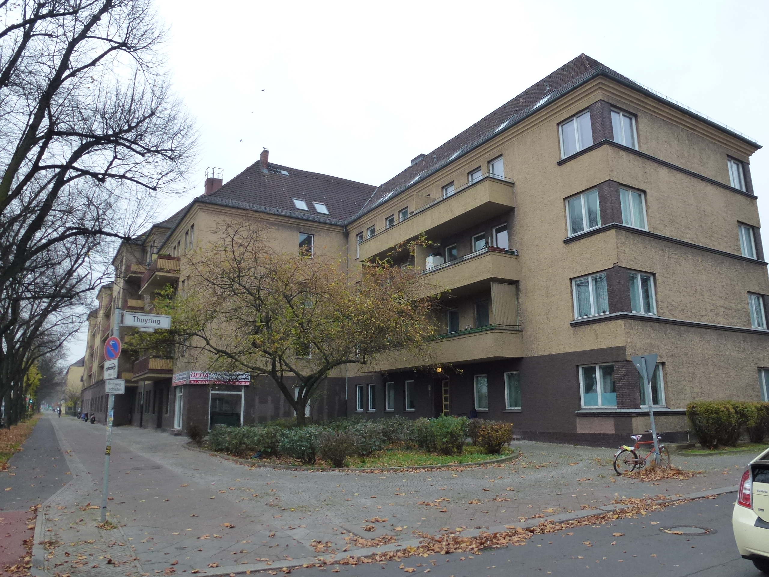 Berlin-Tempelhof Tempelhofer Damm Neu-Tempelhof